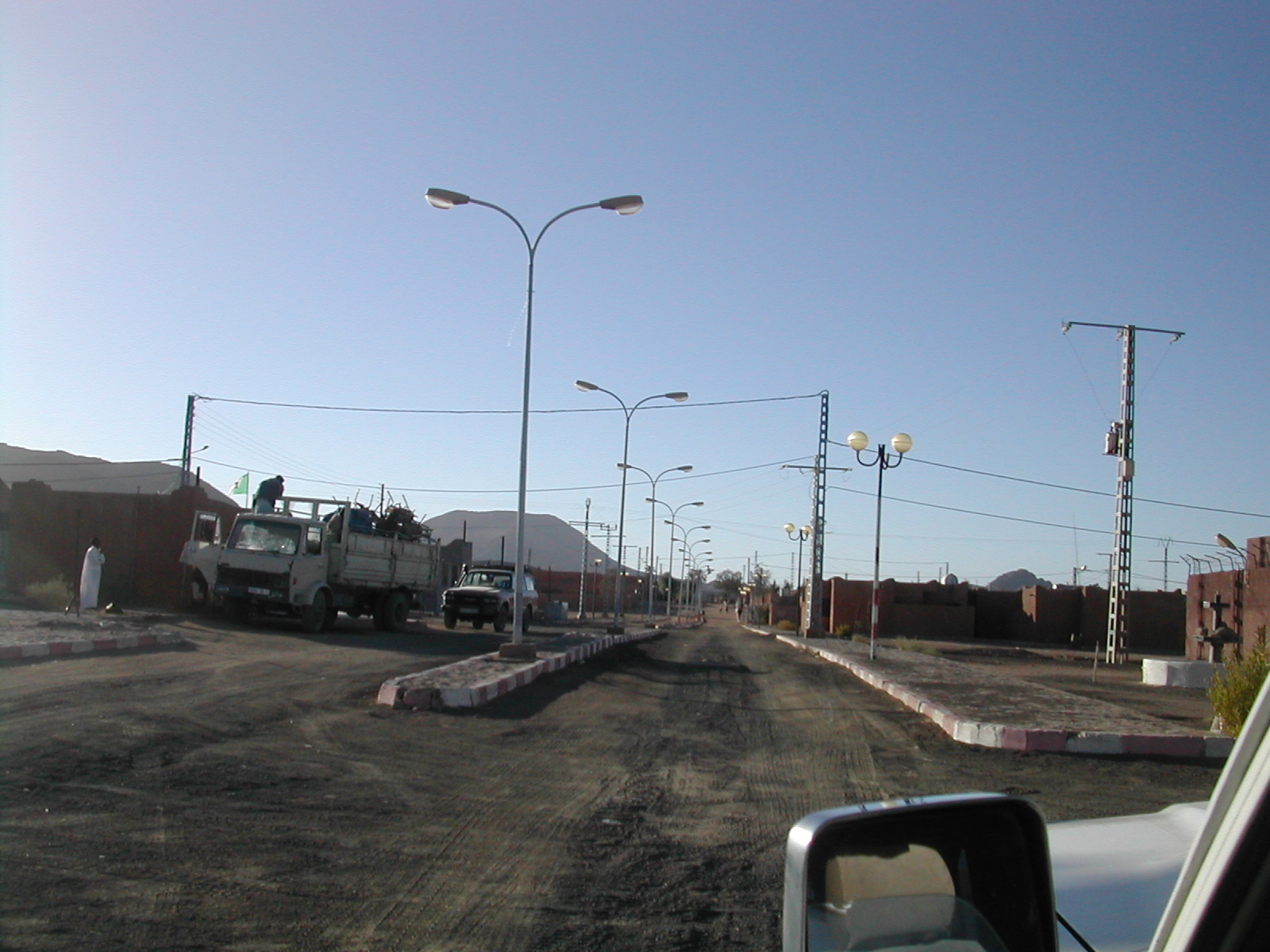 Ideles Algérie